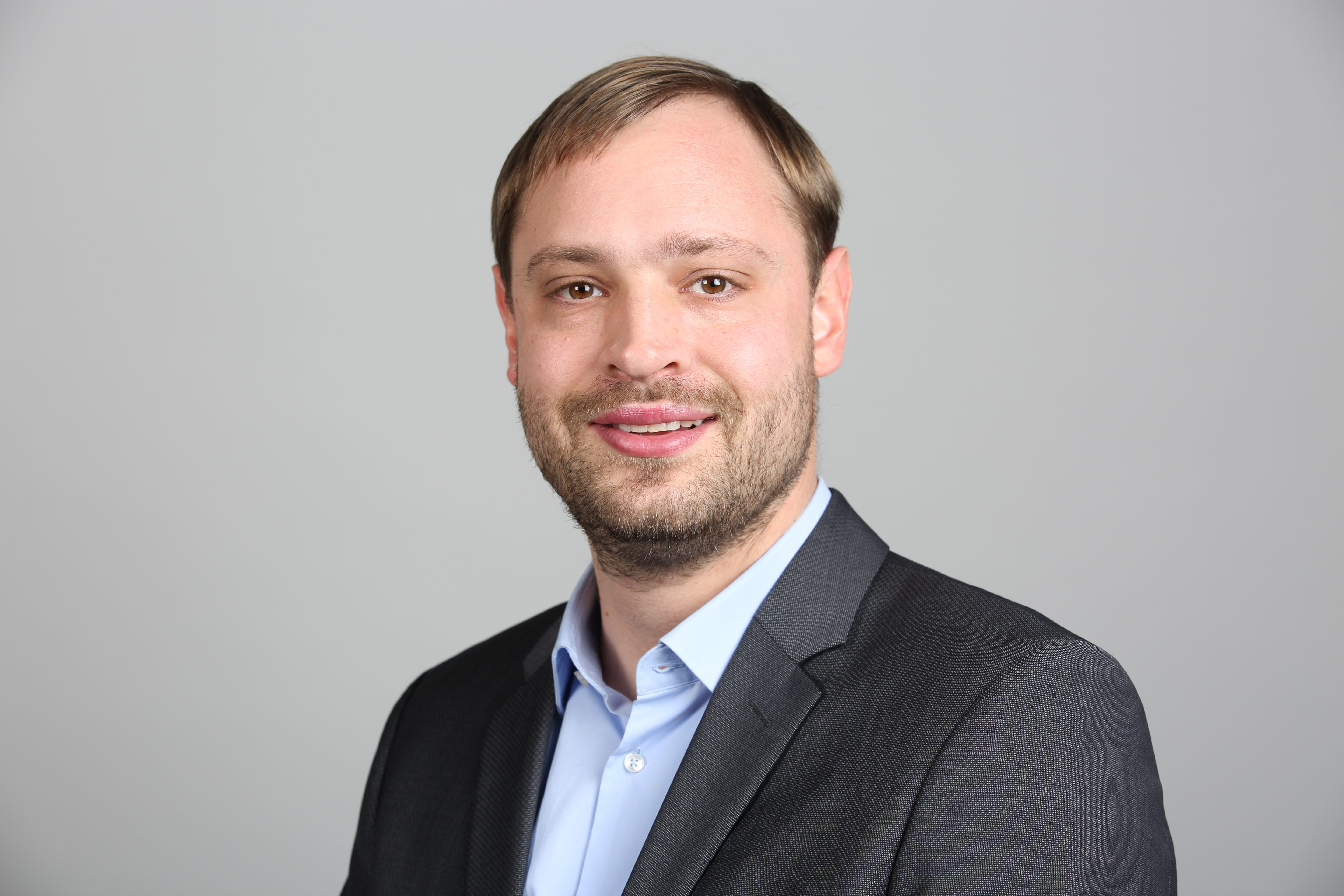 Alexander Dierks (CDU)